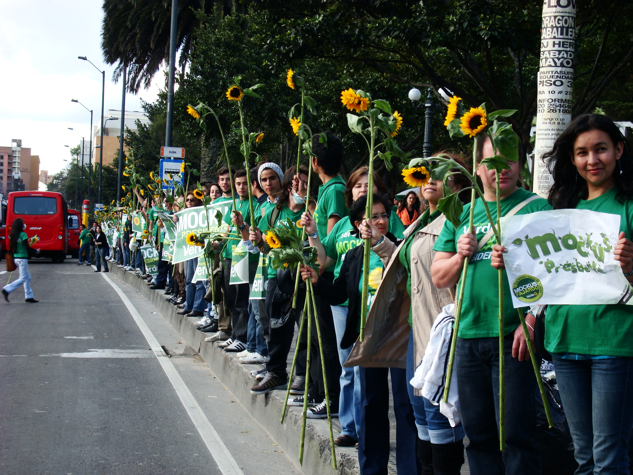 Partidarios de Antanas Mockus. 2010